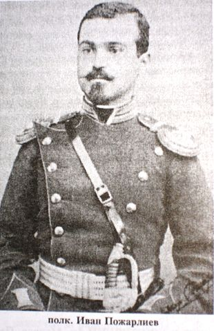 portrait